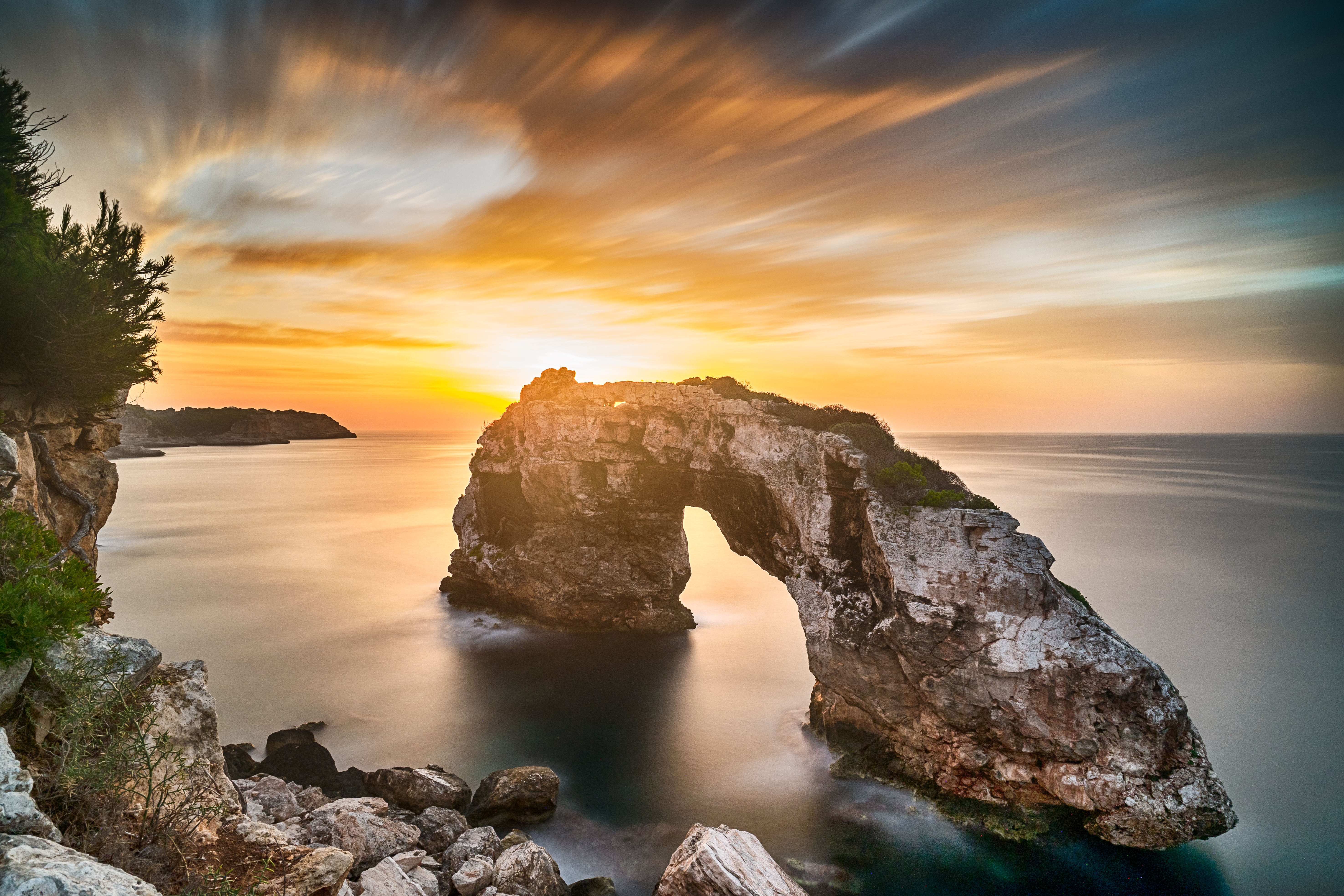 Es Pontàs, Santanyí